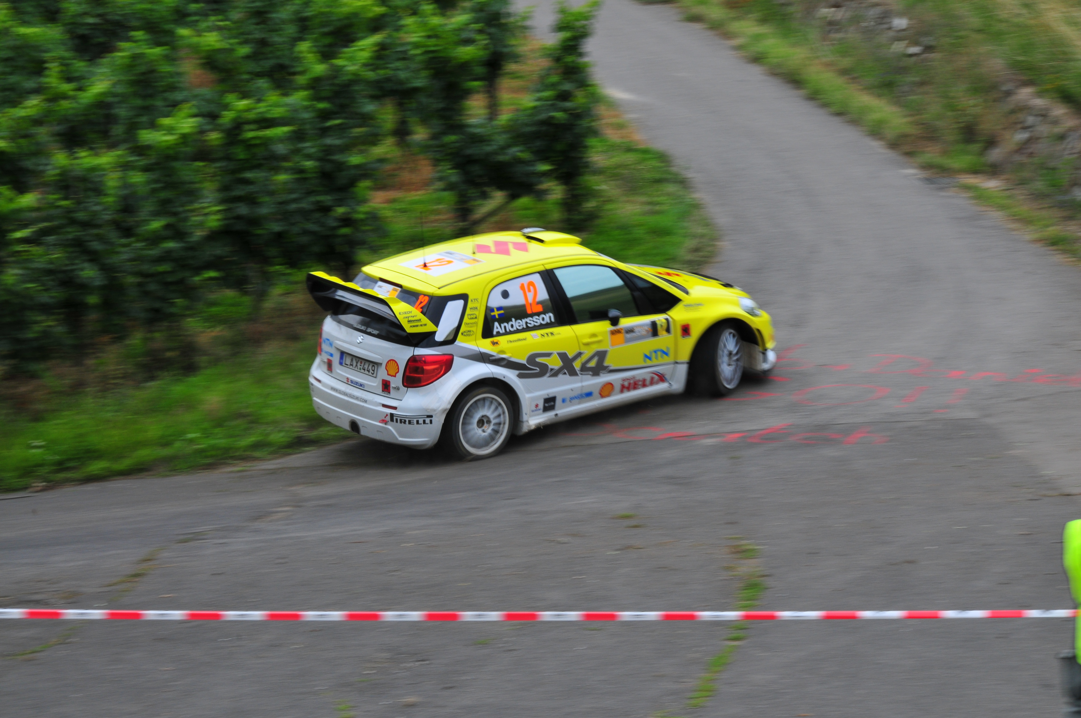 Per-Gunnar Andersson driving his Suzuki SX4 WRC at the 2008 Rallye Deutschland.